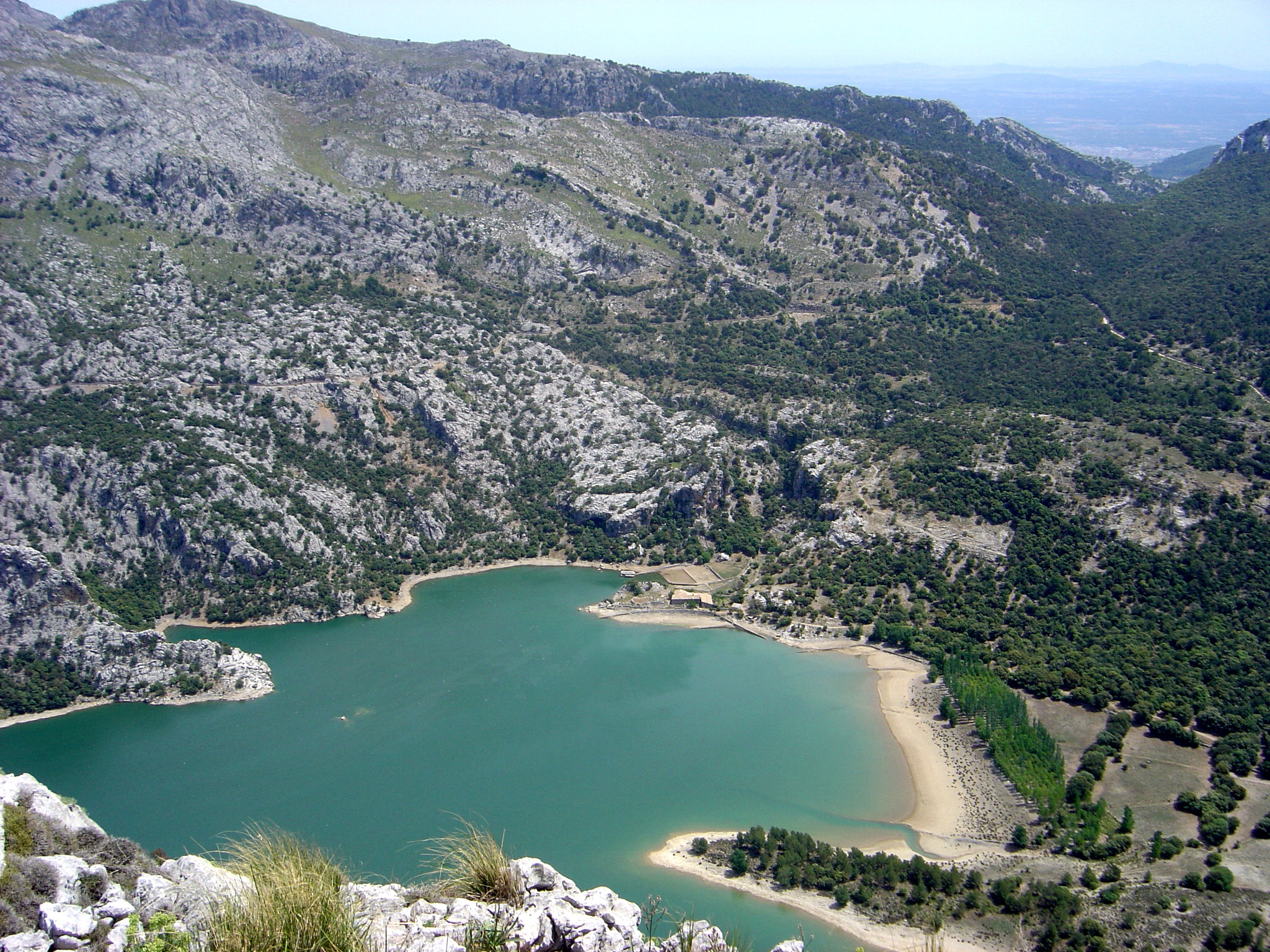 Embassament del Gorg Blau, des del Puig de Ses Vinyes. Escorca. Mallorca (Espanya).